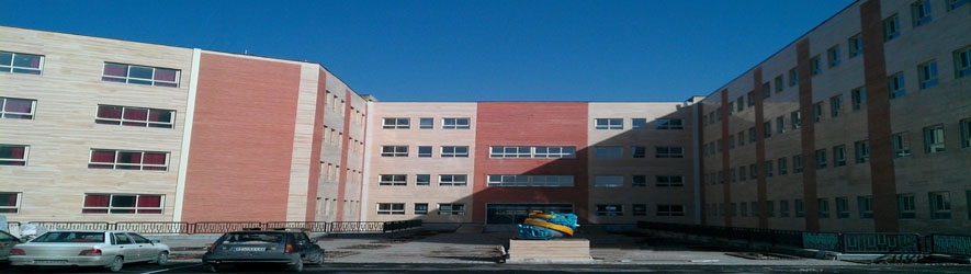 نمايي از ساختمان مجهز و جديد دانشكده فنى و حرفه اى سما مشهد